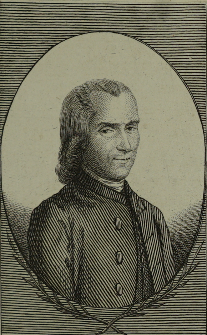 dans "Mémoires historiques et critiques pour l’histoire de Troyes".